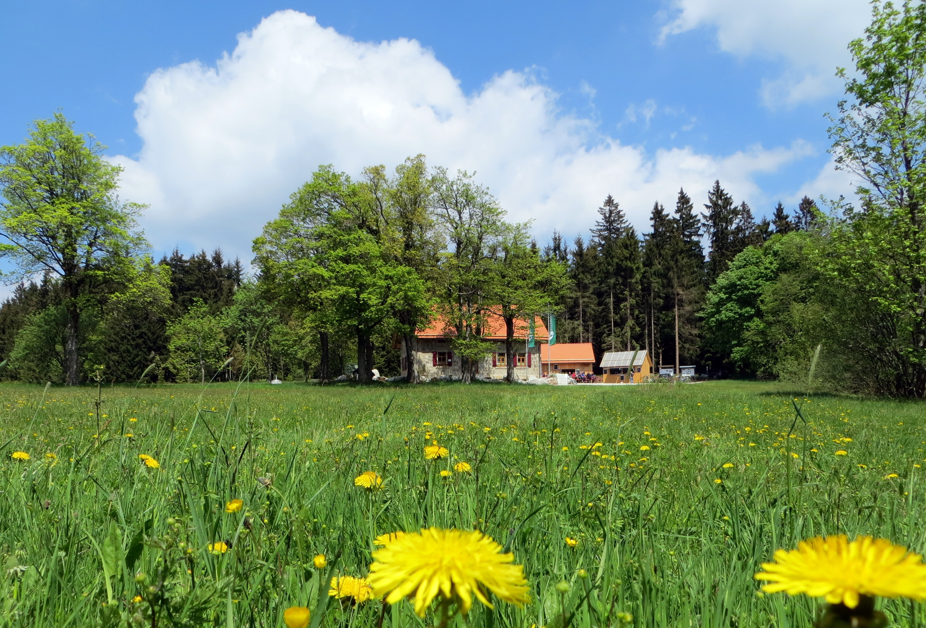 Blick zum Waldhaus